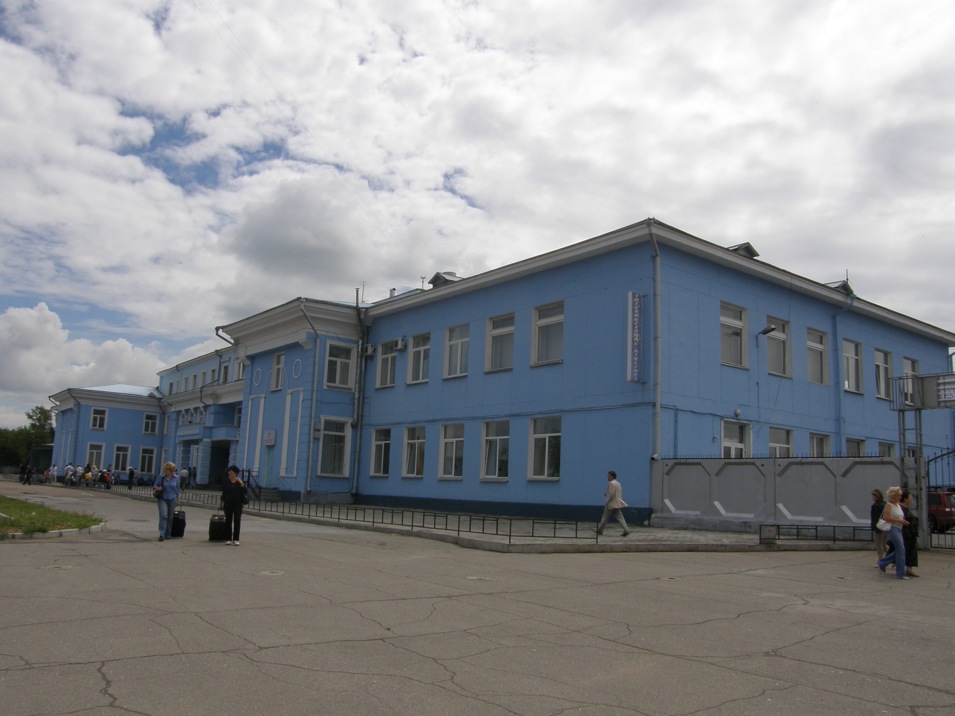 Международный терминал Иркутского аэропорта Intrnational terminal of Irkutsk airport